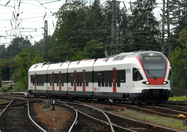 Schweizerische Bundesbahnen (SBB) treinstel van de serie RABe 526 65x (sinds 2011 RABe 521 20x) op 6 september 2007 te Singen (Hohentwiel). Deze treinen worden tot 20xx ingezet op de Seehas traject tussen Konstanz en Engen over het traject van de Hochrheinbahn en de Schwarzwaldbahn